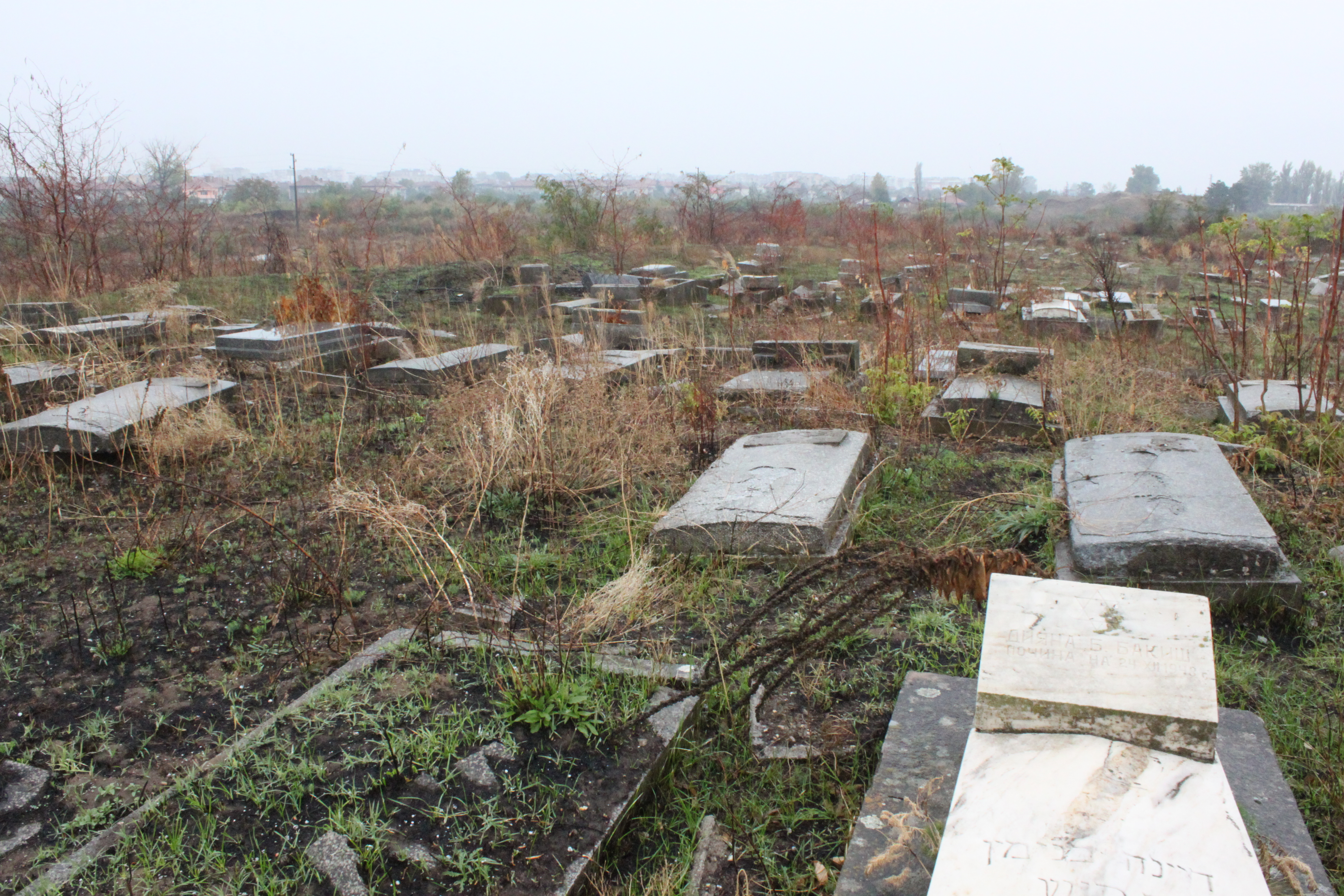 Jüdischer Friedhof Widin